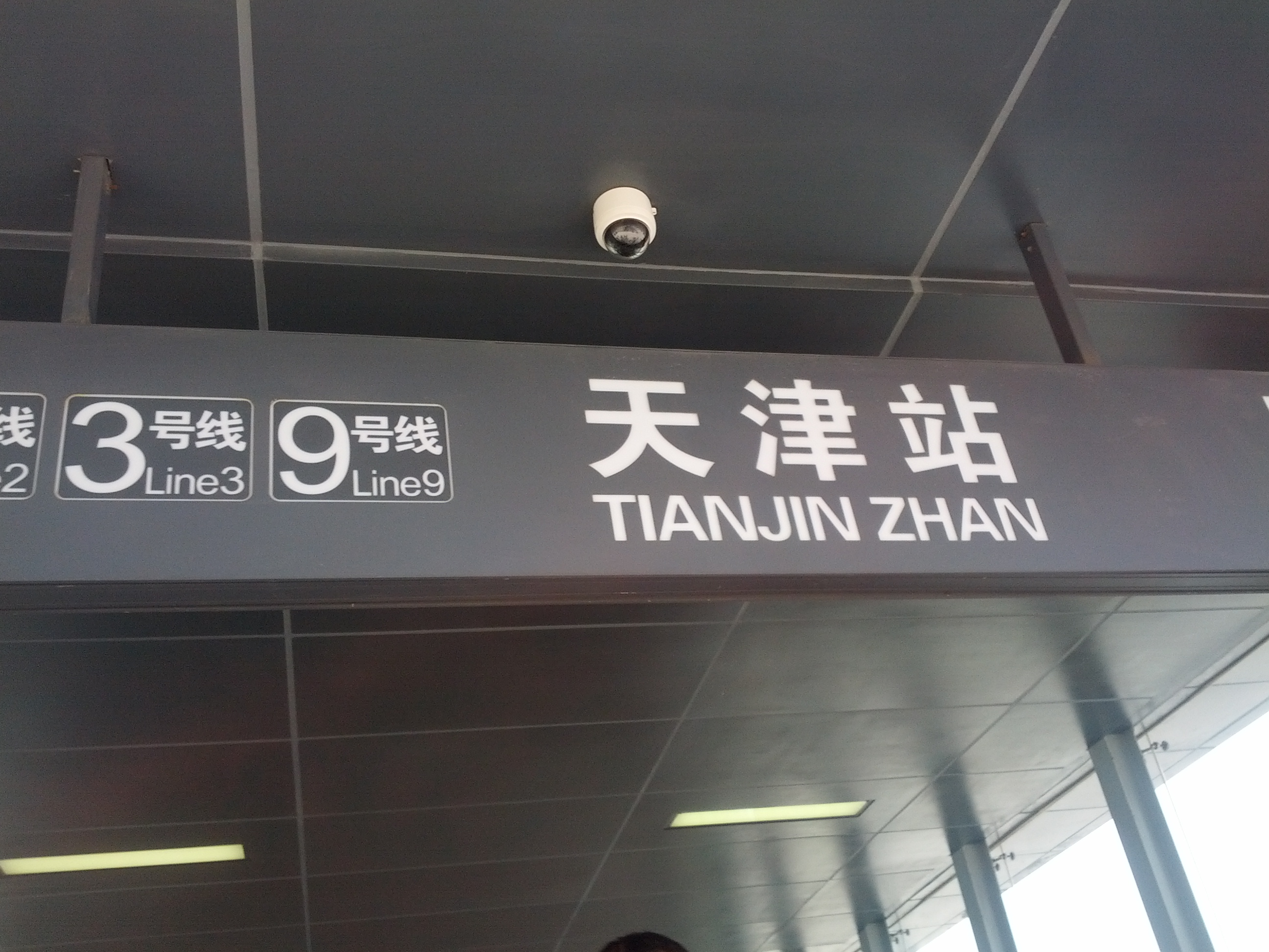 天津地铁天津站站7号出口